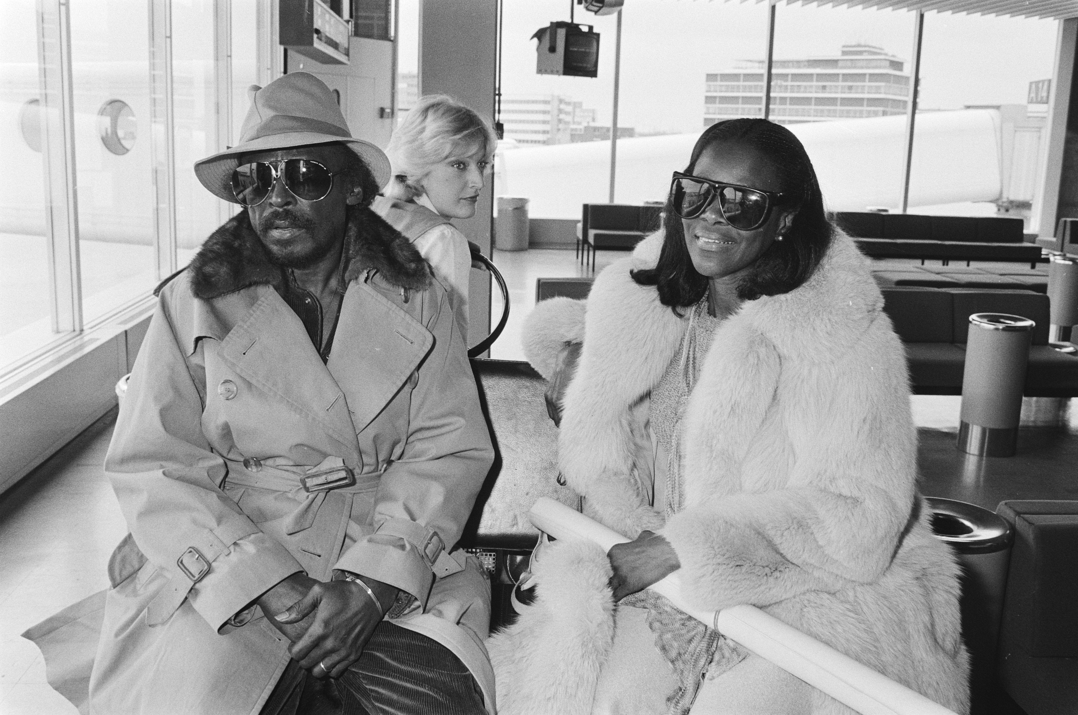 Collectie / Archief : Fotocollectie Anefo Reportage / Serie : [ onbekend ] Beschrijving : Aankomst jazz-trompetist Miles Davis op Schiphol. Miles Davis en zijn vrouw Cecily Tyson (actrice Roots) Datum : 27 april 1982 Locatie : Noord-Holland, Schiphol Trefwoorden : aankomsten, actrices, musici Fotograaf : Antonisse, Marcel / Anefo Auteursrechthebbende : Nationaal Archief Materiaalsoort : Negatief (zwart/wit) Nummer archiefinventaris : bekijk toegang 2.24.01.05 Bestanddeelnummer : 932-1250